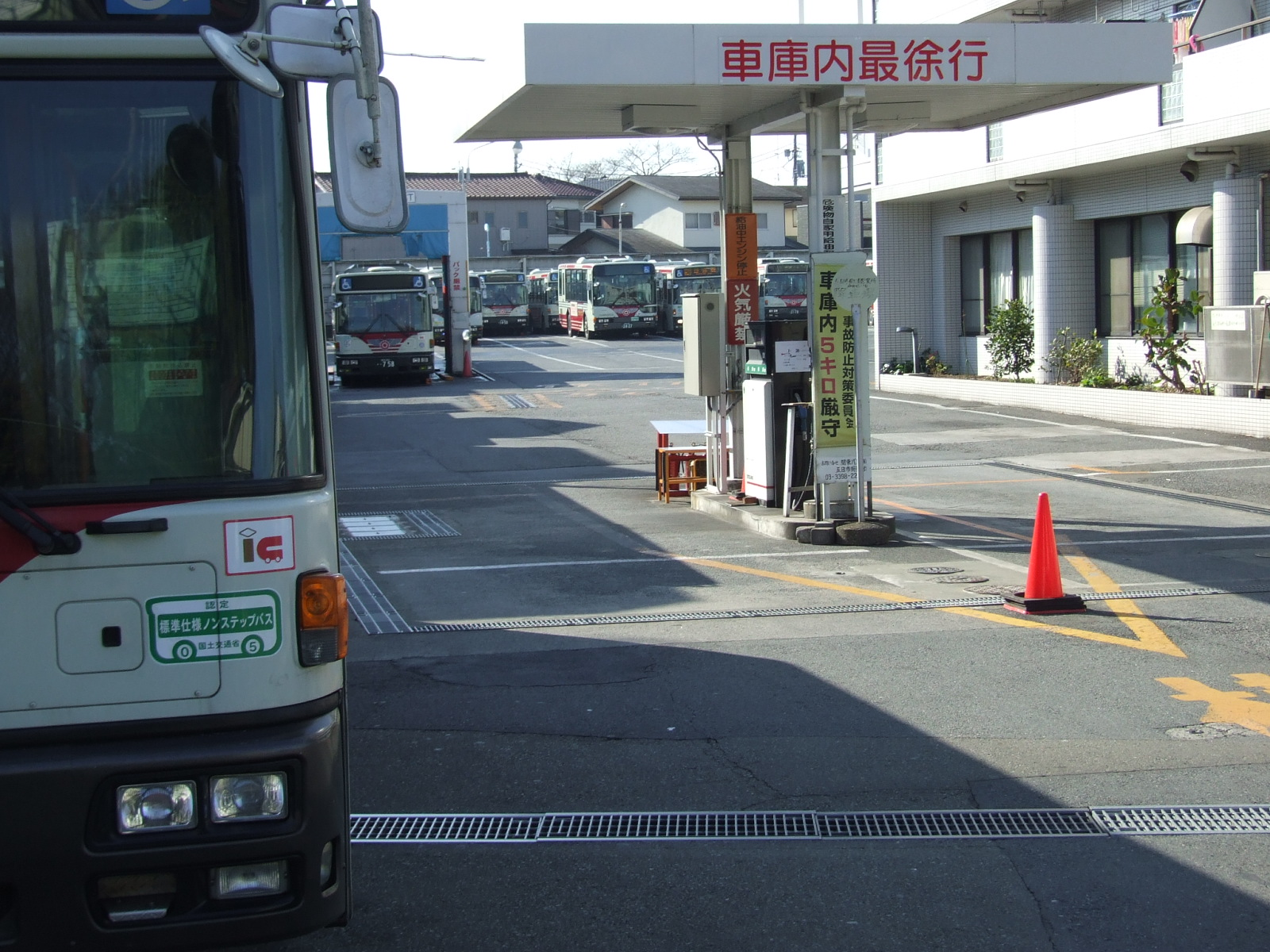 関東バス五日市街道営業所。(五日市街道下り方向)。写真左側手前が松の木路線専用駐車場、その他が他のバスの駐車場。写真右側は営業所の建物